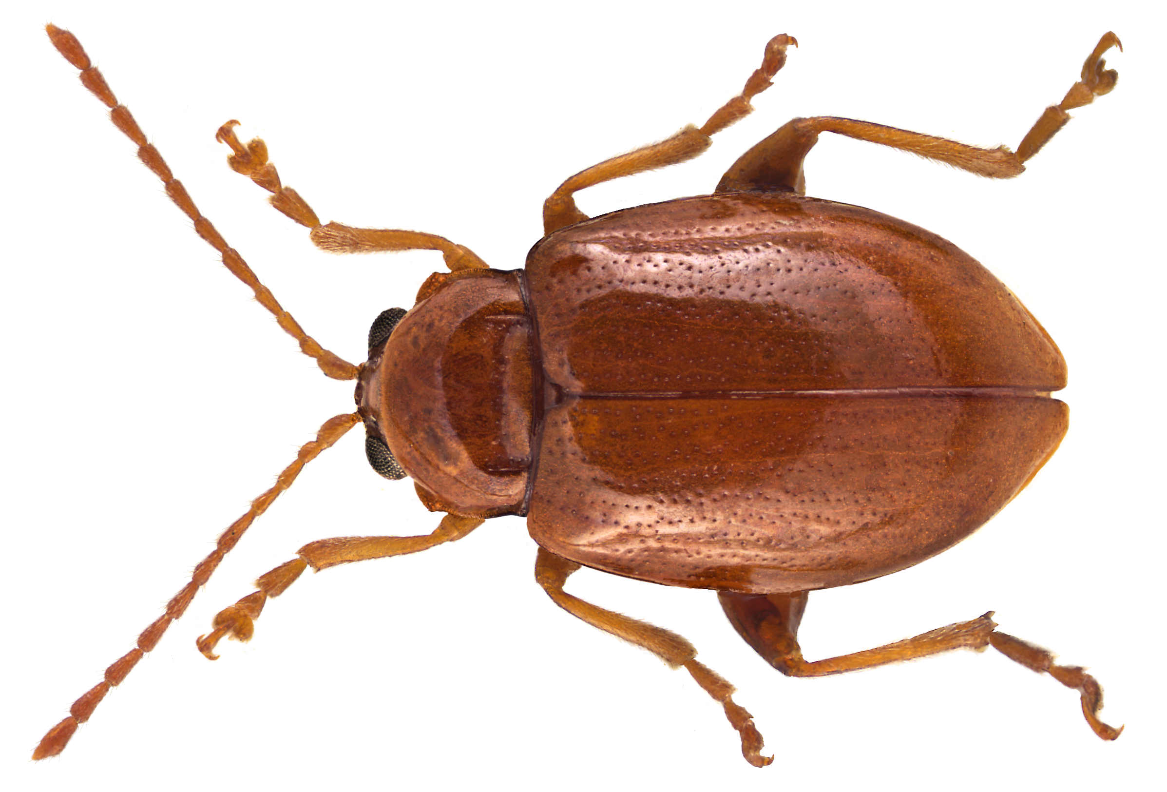 Family: Chrysomelidae Size: 4,3 mm Location: Tunisia, Ain Draham leg. Mager & Muehle, 24.VI.1976; det. Fritzlar, 2002 Photo: U.Schmidt, 2015